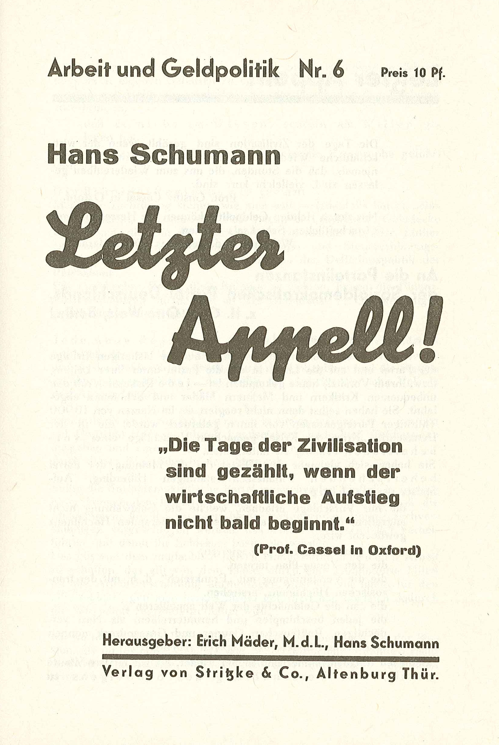 Mitte 1932 veröffentlichten Hans Schumann und Erich Mäder das Flugblatt Letzter Appell an die Parteiinstanzen der SPD, in dem sie erneut eine Auseinandersetzung mit den geldpolitischen Ursachen der Wirtschaftskrise forderten.